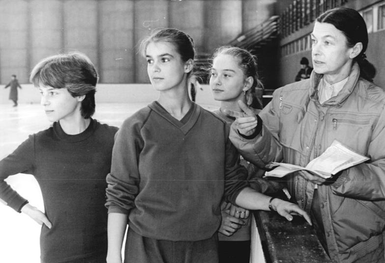 Simone Lang, Katarina Witt, Constanze Gensel, Jutta Müller ADN-ZB Thieme 25.12.1984 Karl-Marx-Stadt: Eisballerina Katarina Witt.- Zu den Schützlingen der weltbekannten Eiskunstlauf-Trainerin Jutta Müller (SC Karl-Marx-Stadt- r.) gehört auch die 19-jährige Oberschülerin Katarina Witt (2.v.l.). Die "DDR-Sportlerin des Jahres 1984" erkämpfte in der vergangenen Saison Gold bei den Olympischen Spielen und bei der Welt- und Europameisterschaft. In der Eishalle des Berliner Sportforums holte sie sich am 22.12.1984 den fünften DDR-Meistertitel in Folge. Im Foto gehören zur Trainingsgruppe noch Simone Lang (l.) und Constanze Gensel (3.v.l.). Siehe auch Motive 1984-1225-8N, 9N, 11N und 12N.